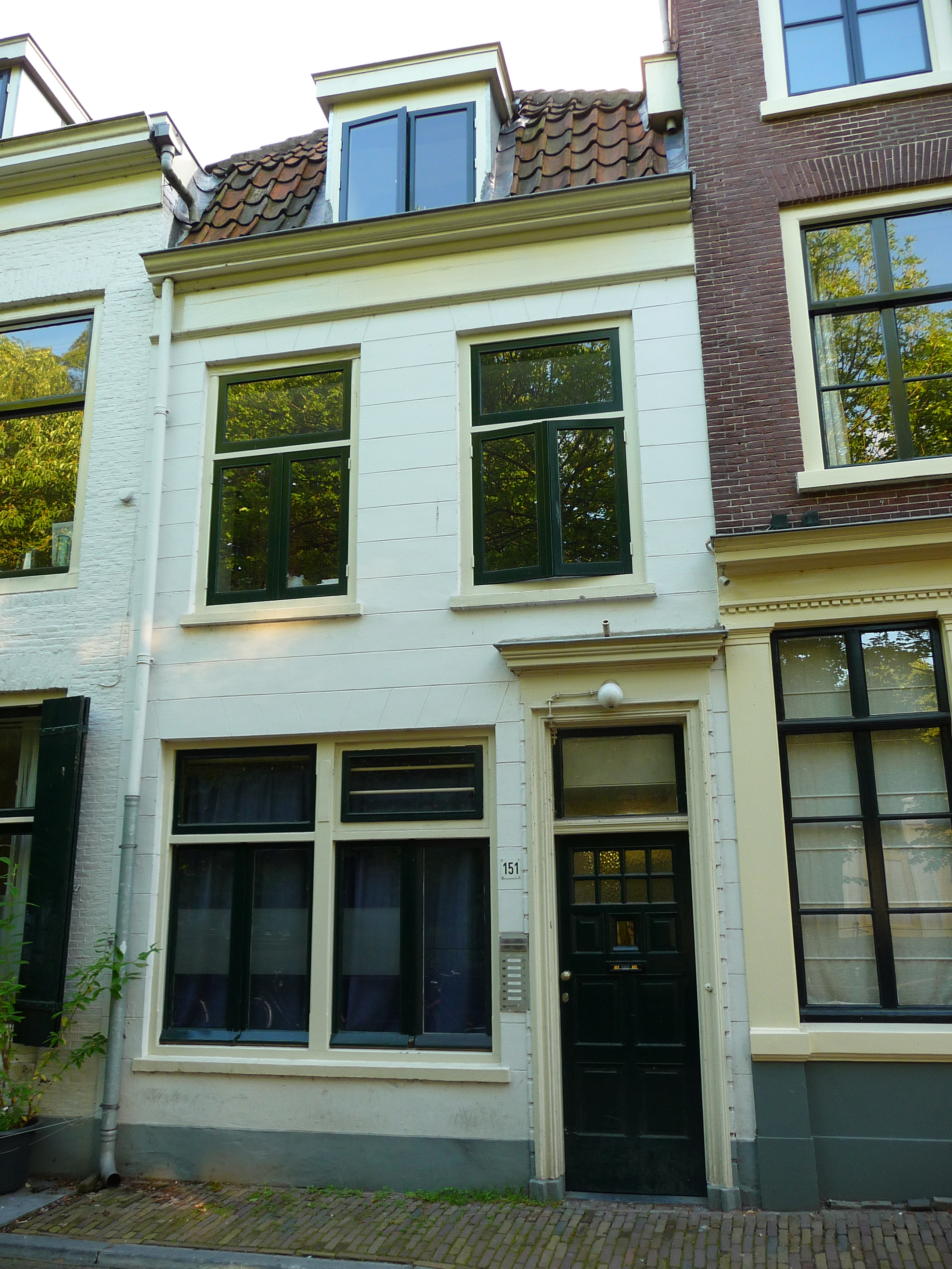 Rijksmonument aan de Nieuwegracht in Utrecht. De verzetsgroep "Oranje Vrijbuiters" gebruikte het in de Tweede Wereldoorlog als hoofdkwartier.